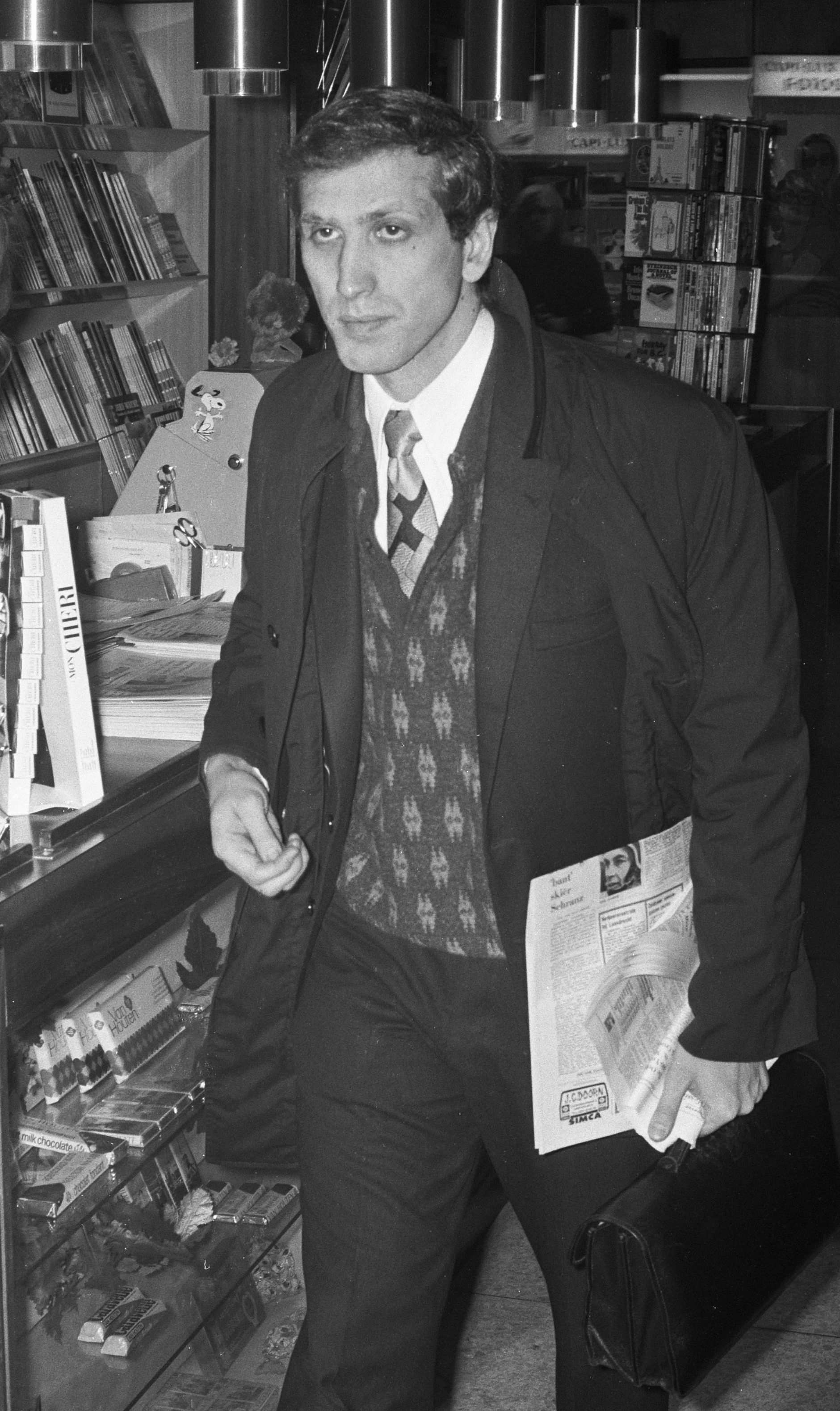 Bobby Fischer in Amsterdam voor besprekingen met FIDE-voorzitter Max Euwe over de tweekamp om het wereldkampioenschap met Boris Spassky. Fischer heeft krant gekocht